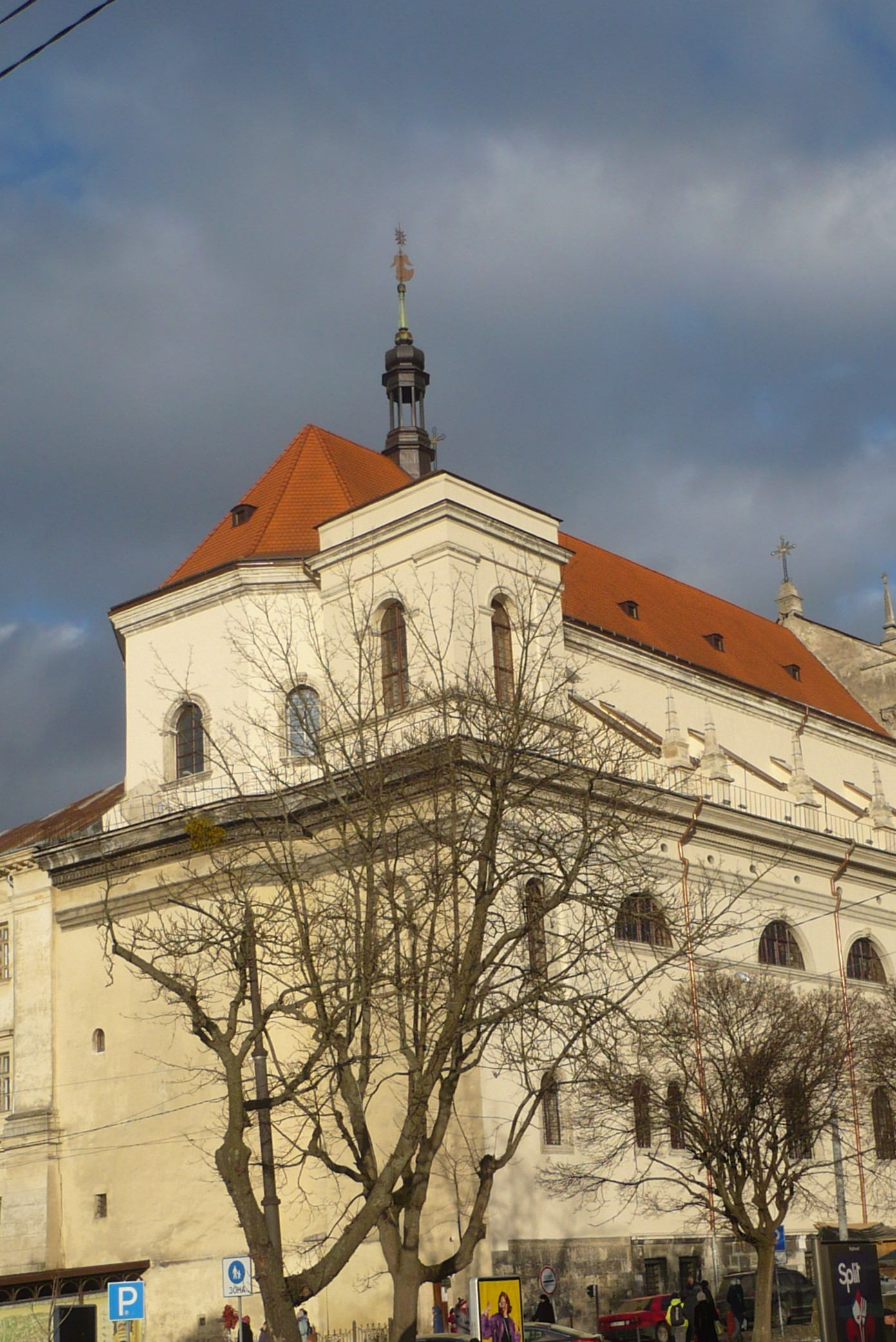 Kościół oo. jezuitów